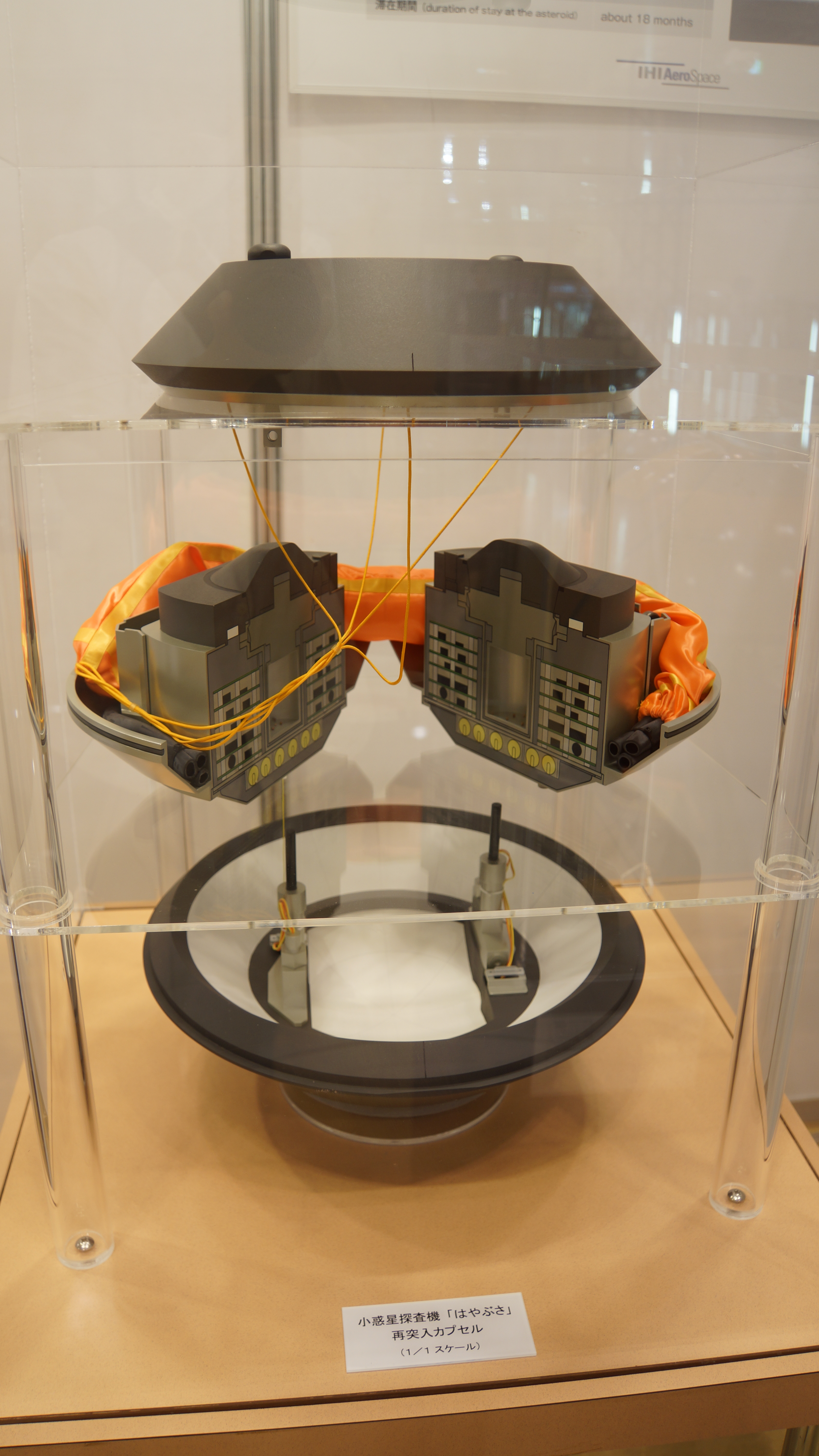 小惑星探査機｢はやぶさ」 再突入カプセル（1/1スケール）。 15年7月4日 神戸国際会議場でのHYOGO-KOBE 宇宙博にて。